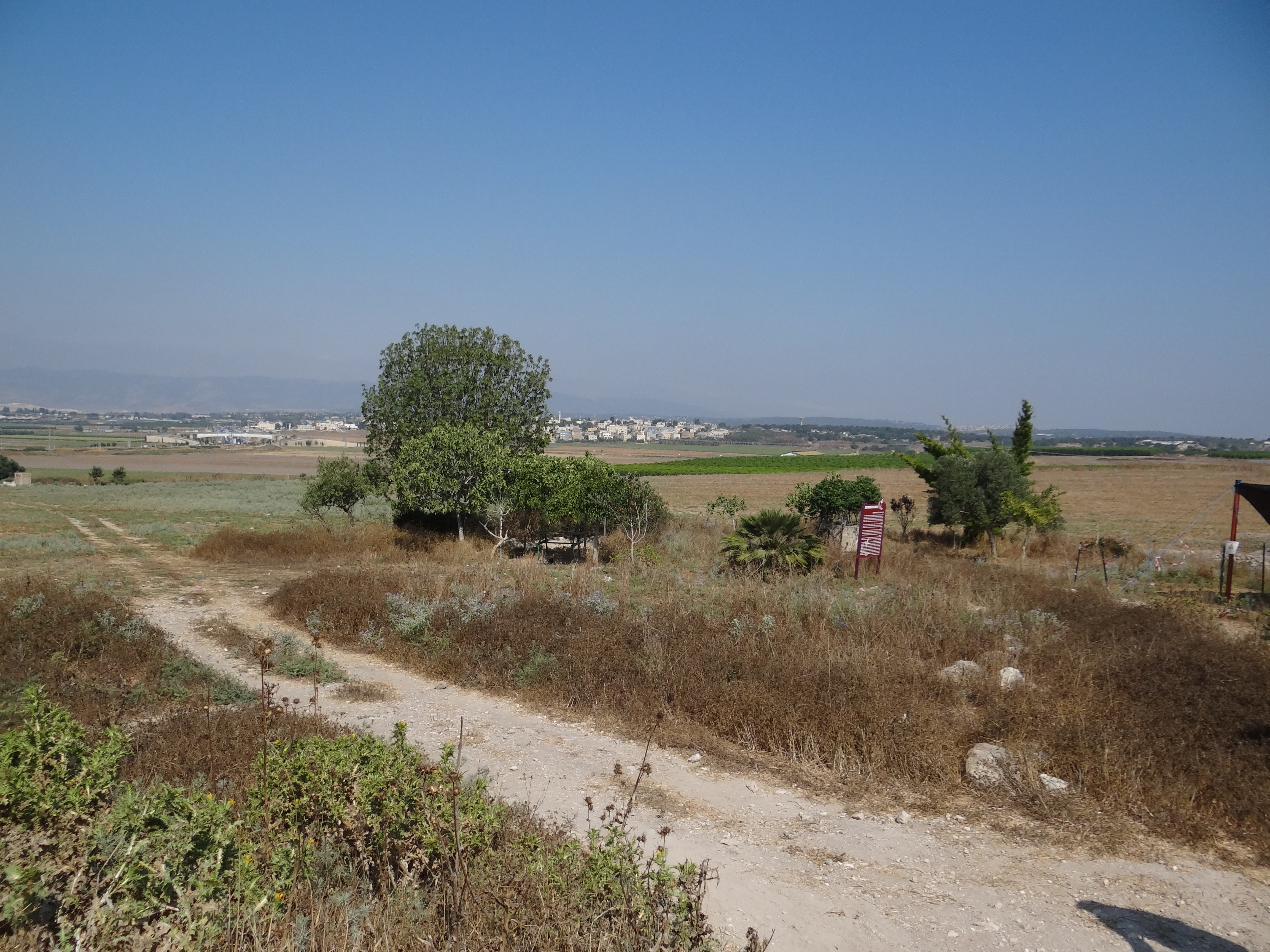 עין שמרון השוכן למרגלות תל שמרון. המעיין שימש את המתיישבים הטמפלרים שהתיישבו במקום ב-1867 ולאחר מכן ב- 1921את ראשוני מתיישבי נהלל שהתיישבו בשטח התל